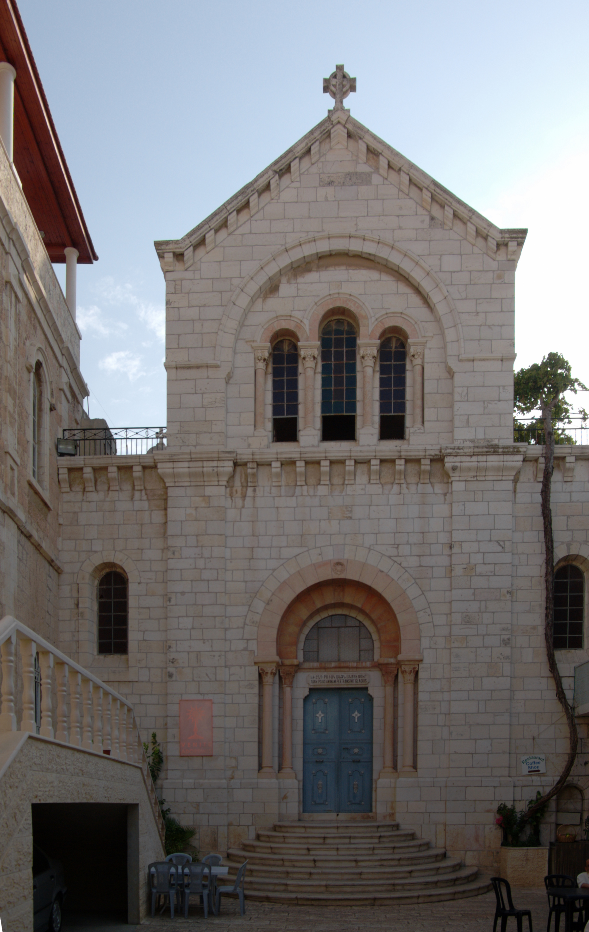 Jerusalem, Kirche der Schmerzen Mariä (1881)